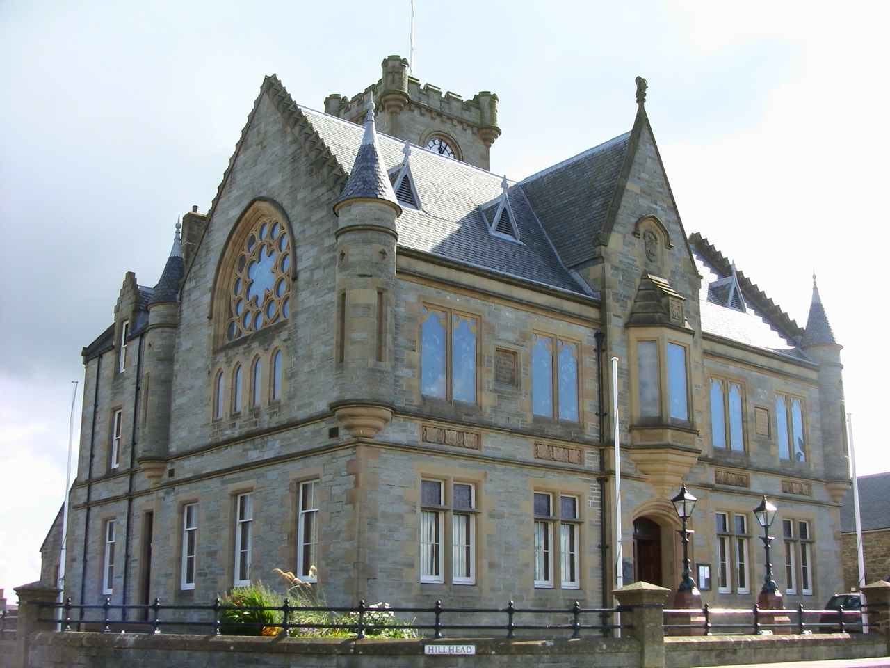 Le Lerwick Town Hall, situé au centre de Lerwick, aux Shetland, en Écosse.